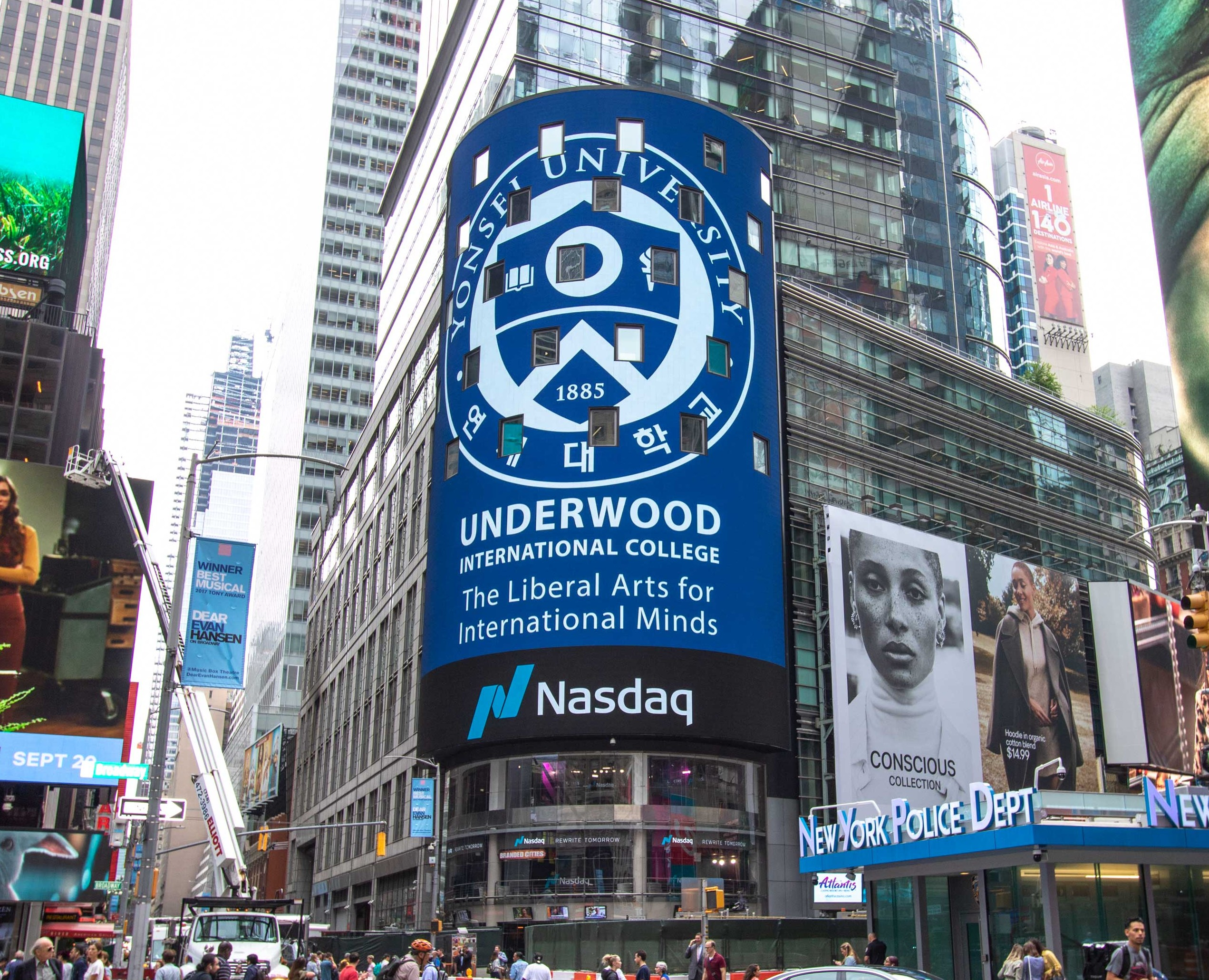 언더우드국제대학 타임스퀘어 전광판 사진